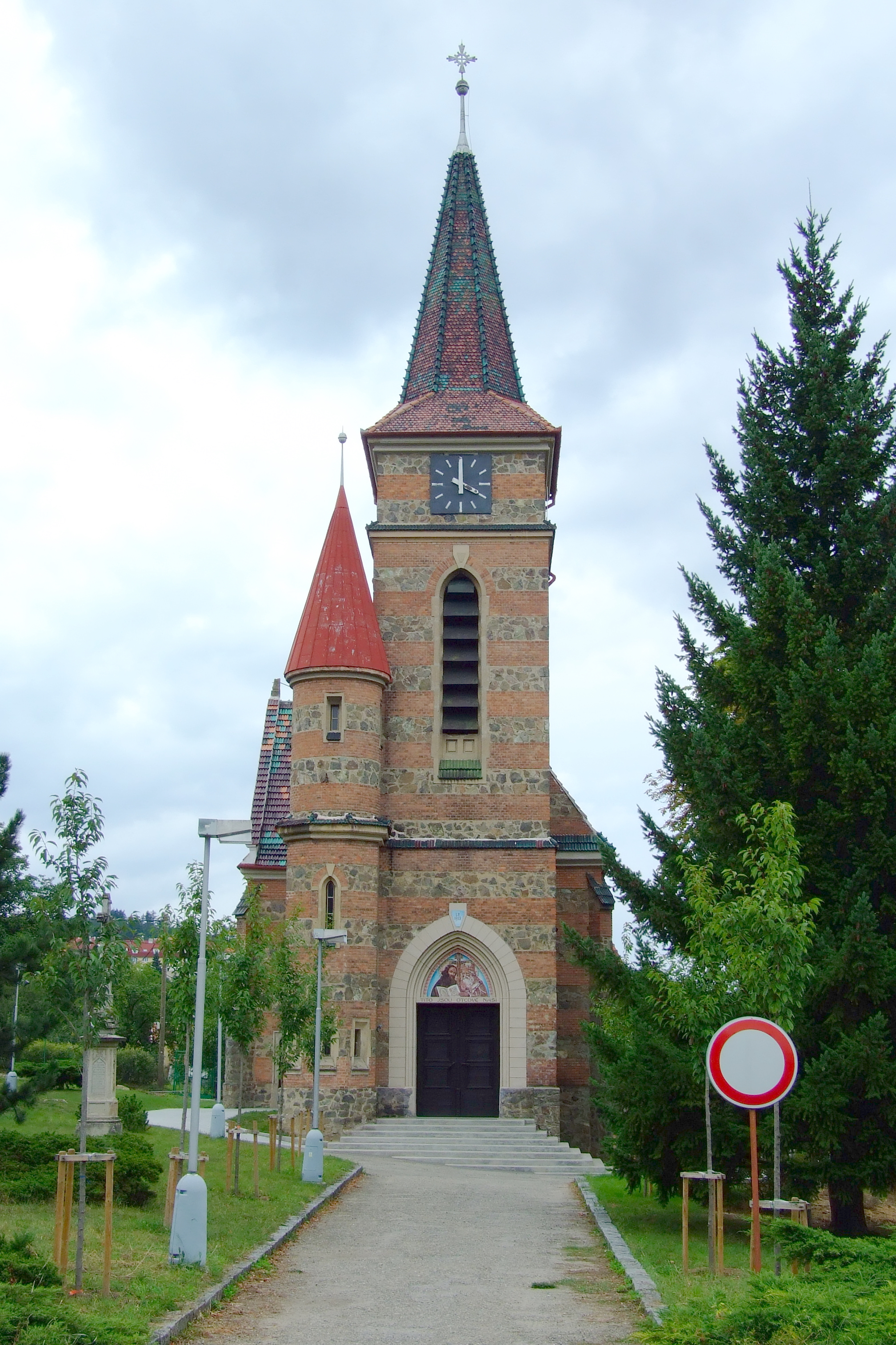 Kostel sv. Cyrila a Metoděje v Bílovicích nad Svitavou